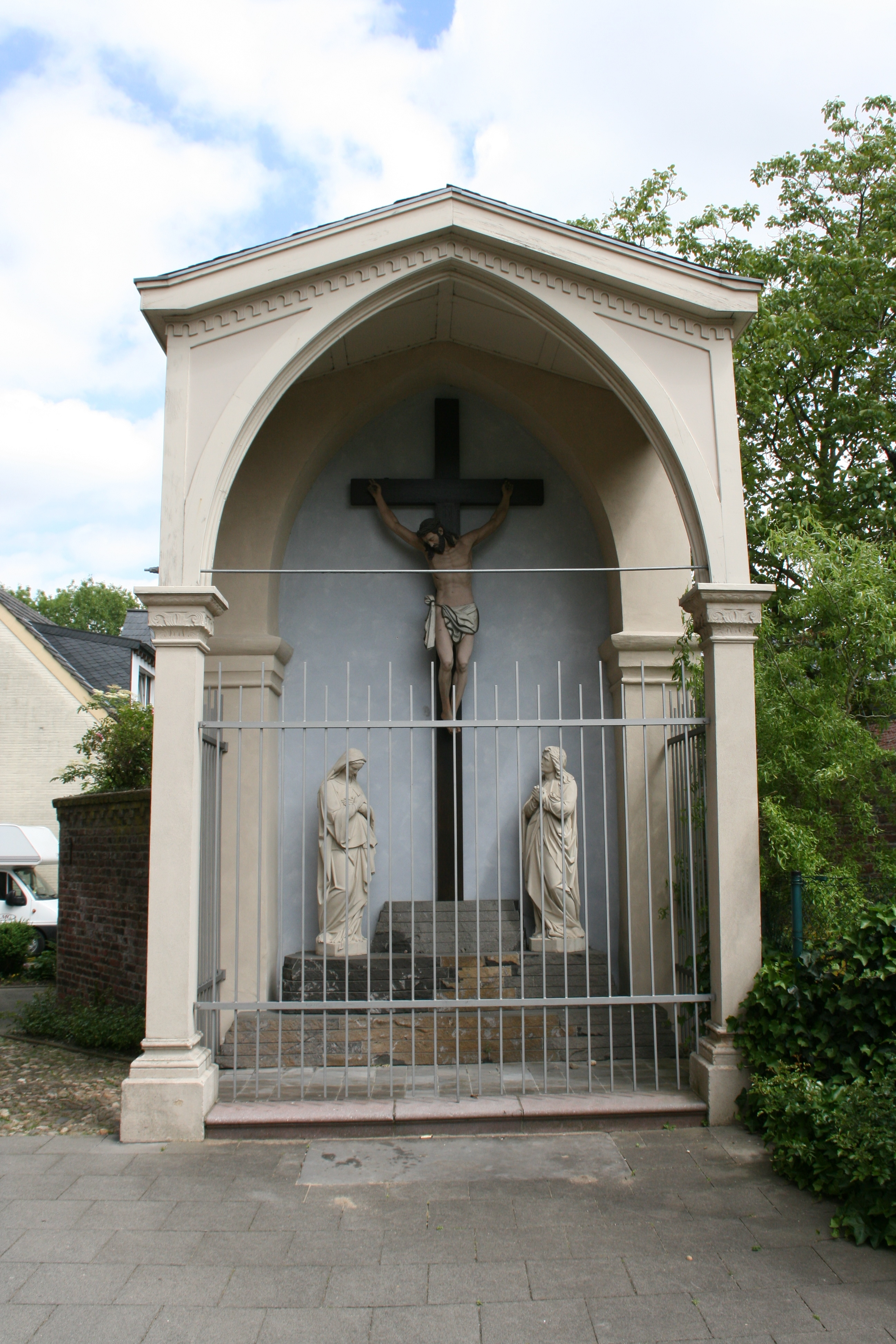 Kalvarienberg an der katholischen Pfarrkirche St.Clemens, Hochstraße in Süchteln, Viersen. Entwurf und Ausführung Wilhelm Joseph Imhoff 1851